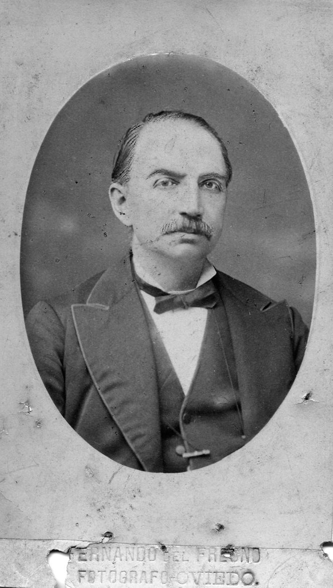 Carlos J. Bertrand, empresario belga afincado en Asturias.